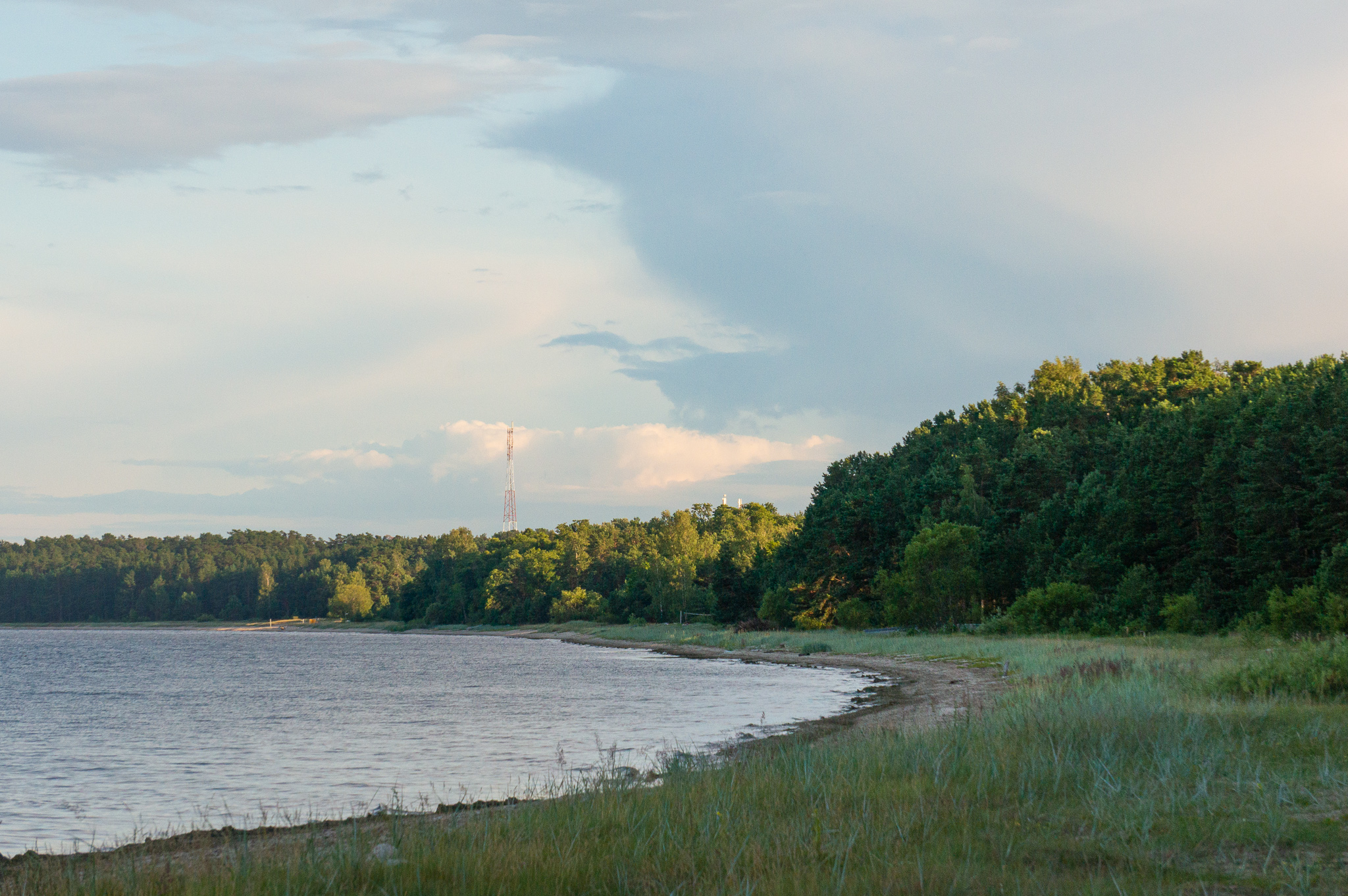 Jūras krasts pie Ķesterciema